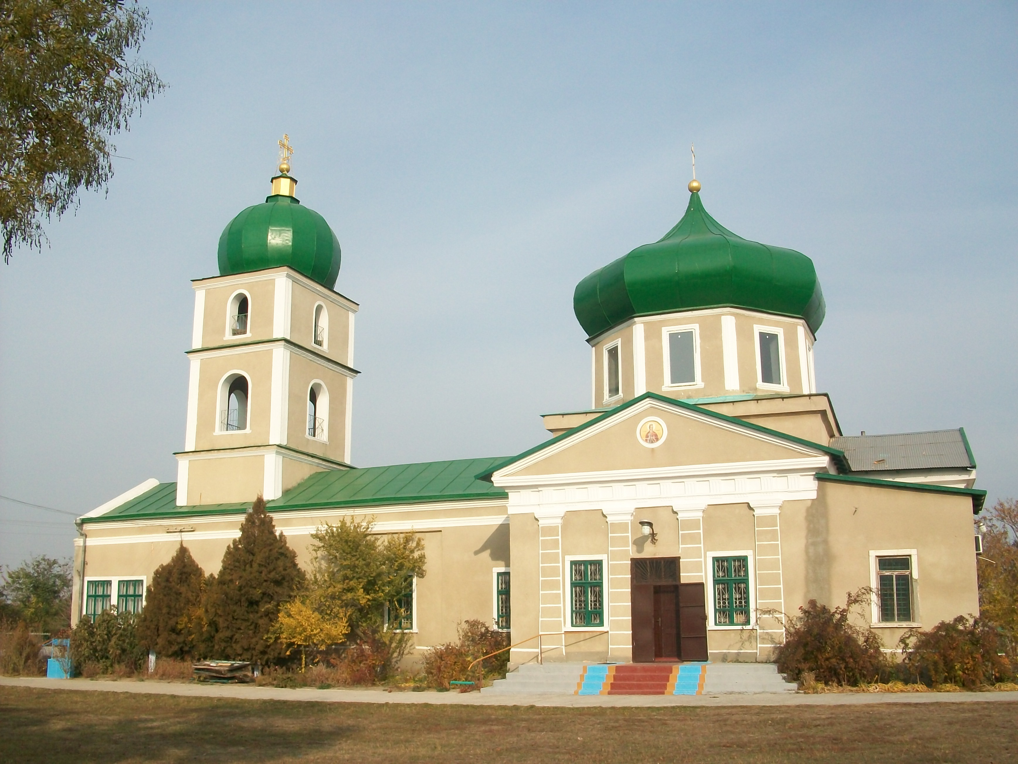 Церковь (Выпасное, Белгород-Днестровский район)